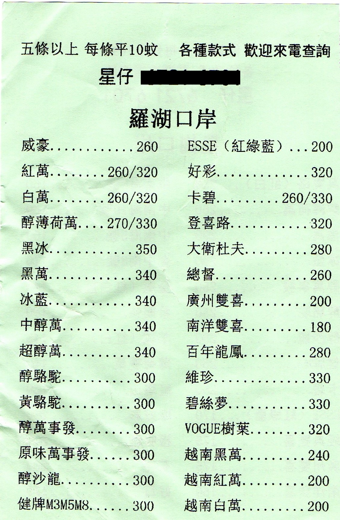 中文（香港）: 私煙廣告宣傳單